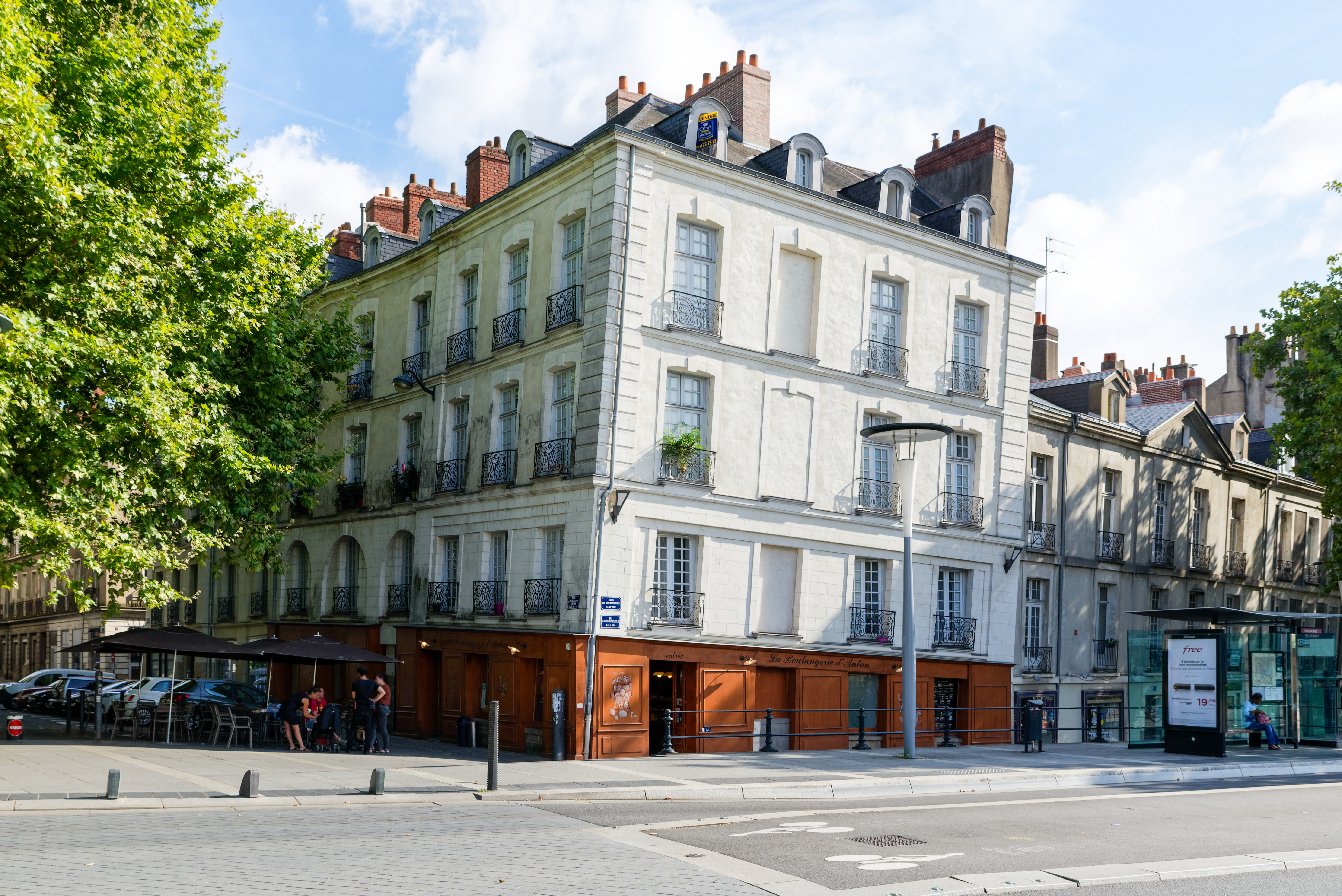 Immeuble consolidé pour éviter son effondrement à l'angle de la place du Port-Communeau et de l'allée d'Erdre. (Nantes, Loire-Atlantique, Pays de la Loire, France)